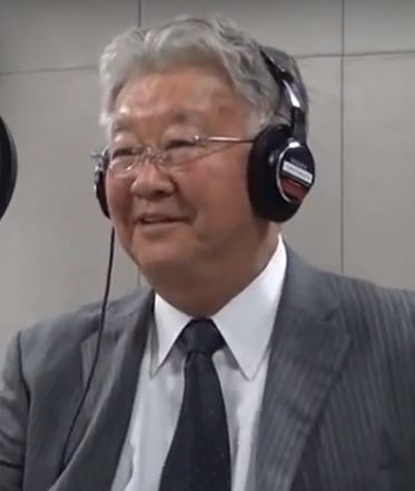 熱血トーカーズ